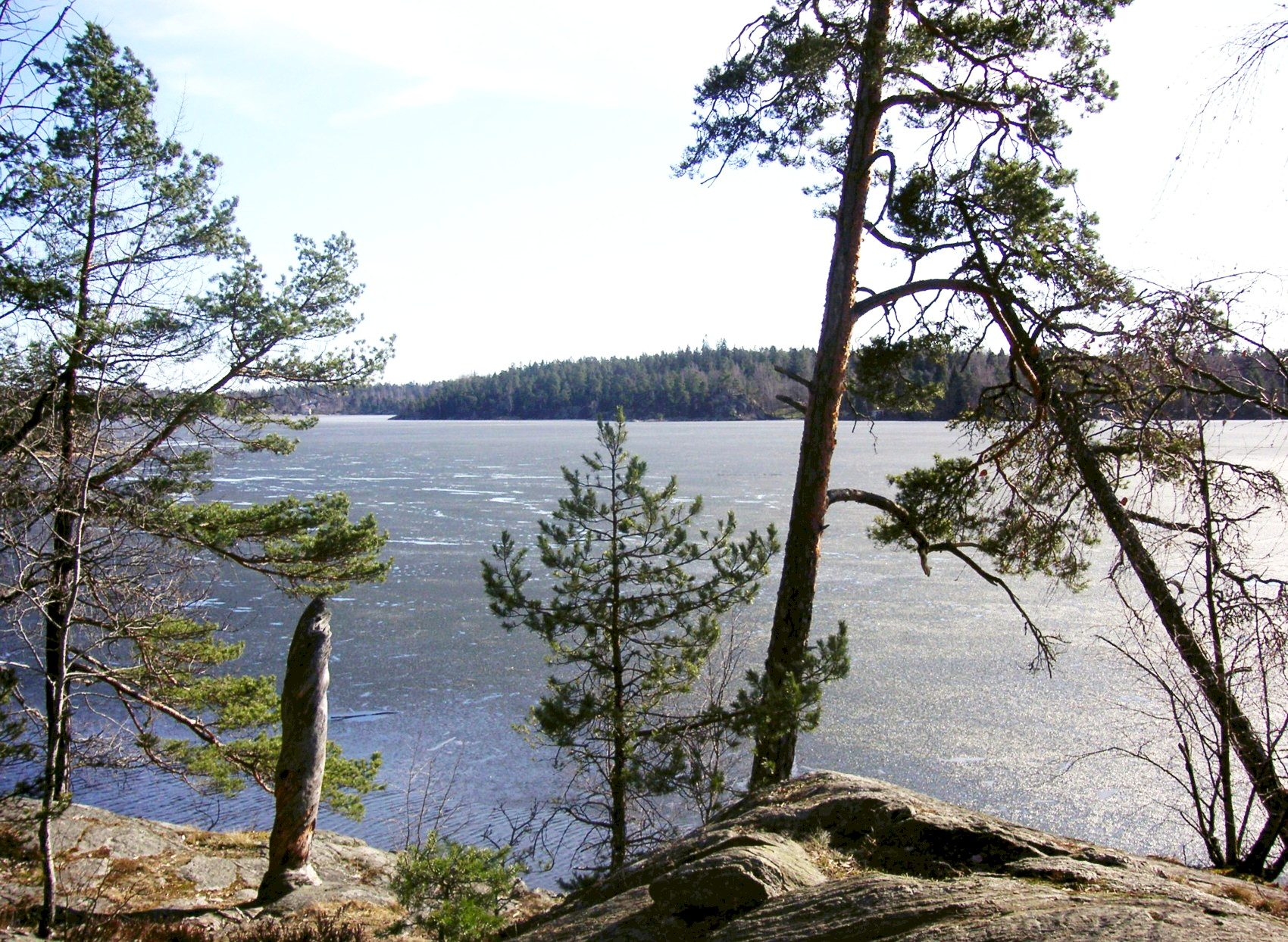 Drevviken i södra Stockholm med mars-is